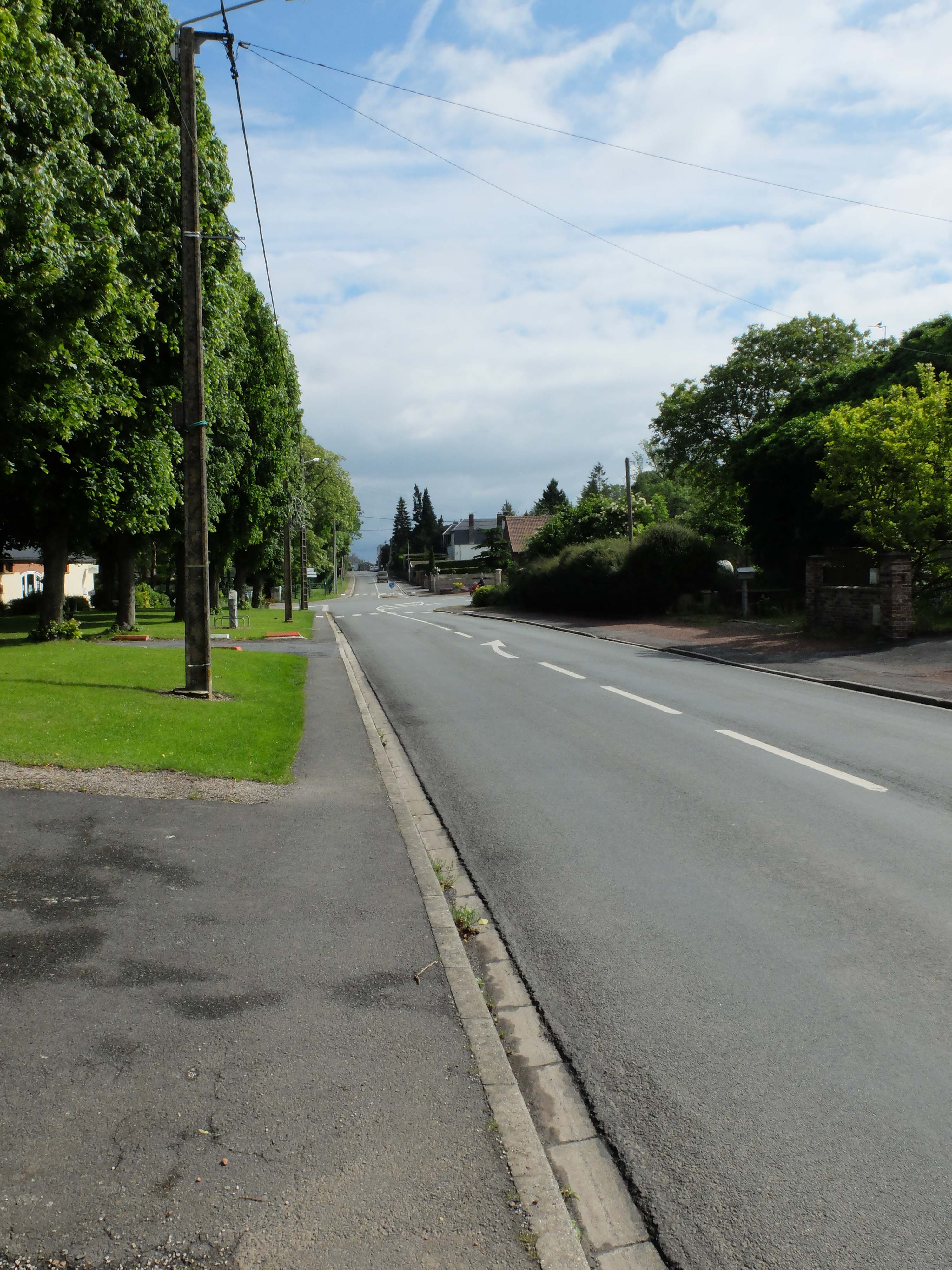 Vue de la rue du Fief d'Écoust-Saint-Mein à hauteur de l'église.